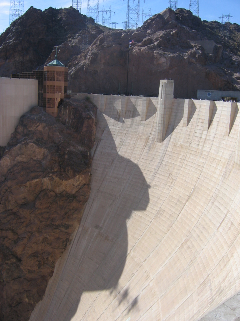 Hoover Dam, USA